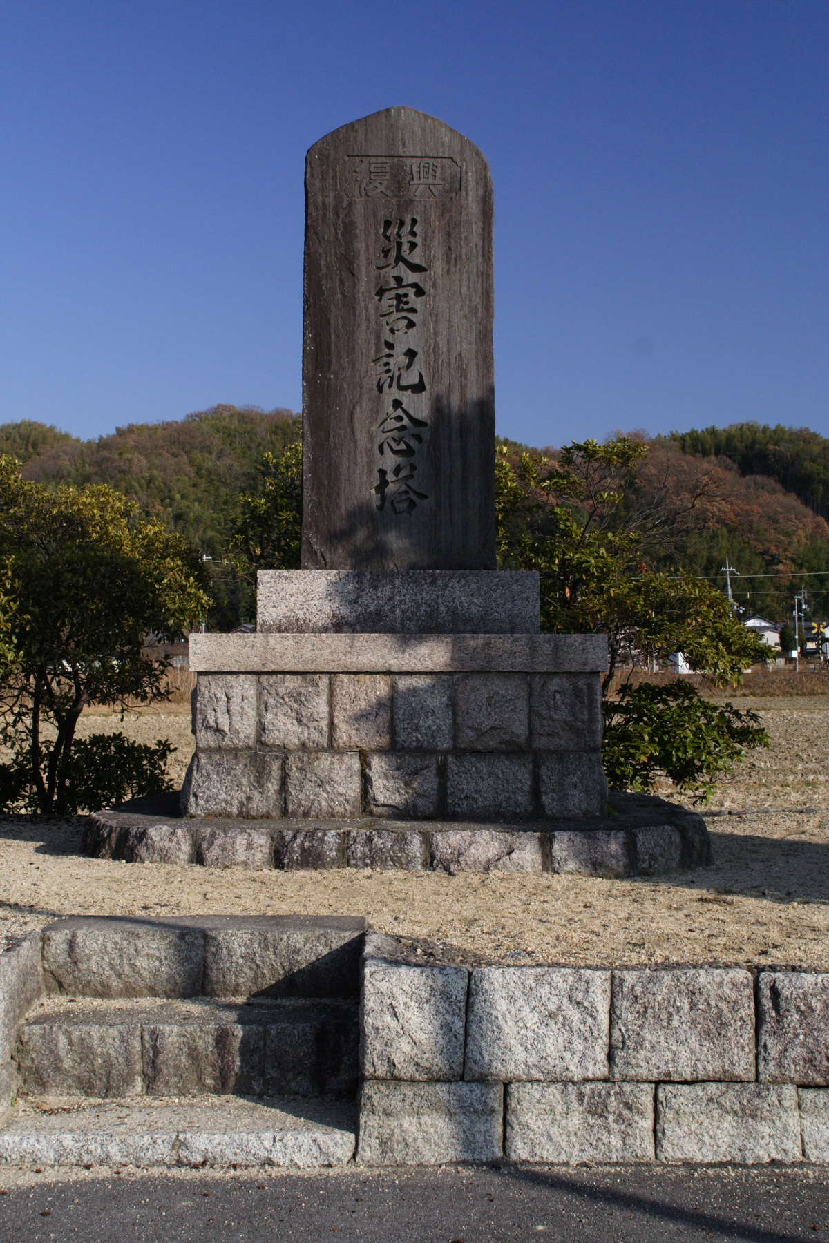 不動川洪水災害記念塔(京都府相楽郡山城町)